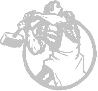 Logo issu de la revue "l'Internationale Communiste"